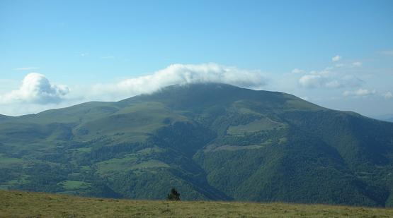 Taga desde Pla de Les Aranyes